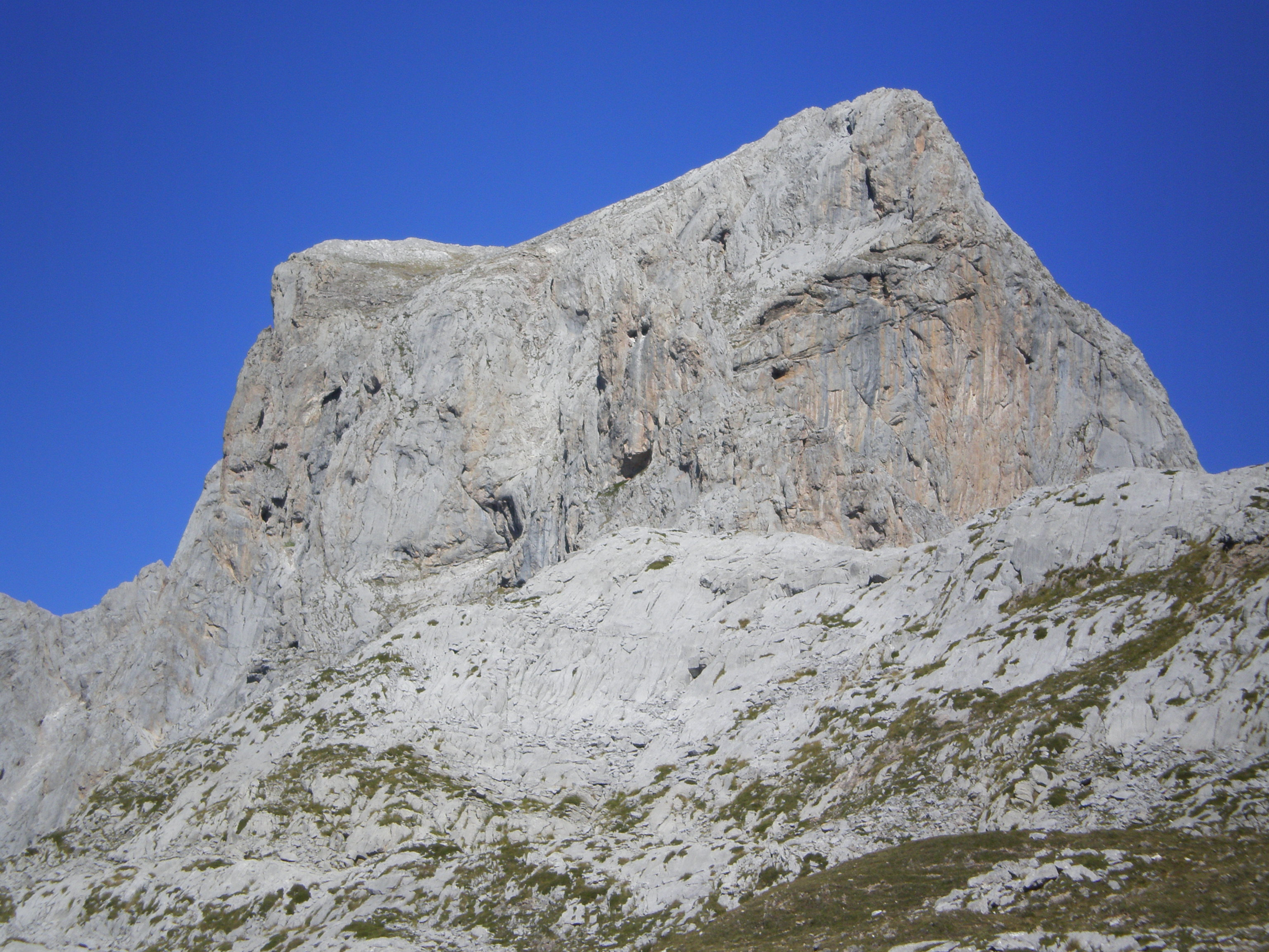 Peña Vieja (2613 msnm) y Peña Olvidada (2406 msnm) desde la estación superior de El Cable, Fuente De, Macizo Central de los Picos de Europa, Cantabria.